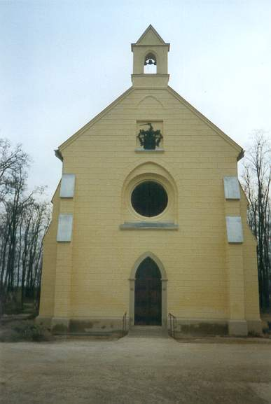 A Lónyay család sírkápolnája Lónyán